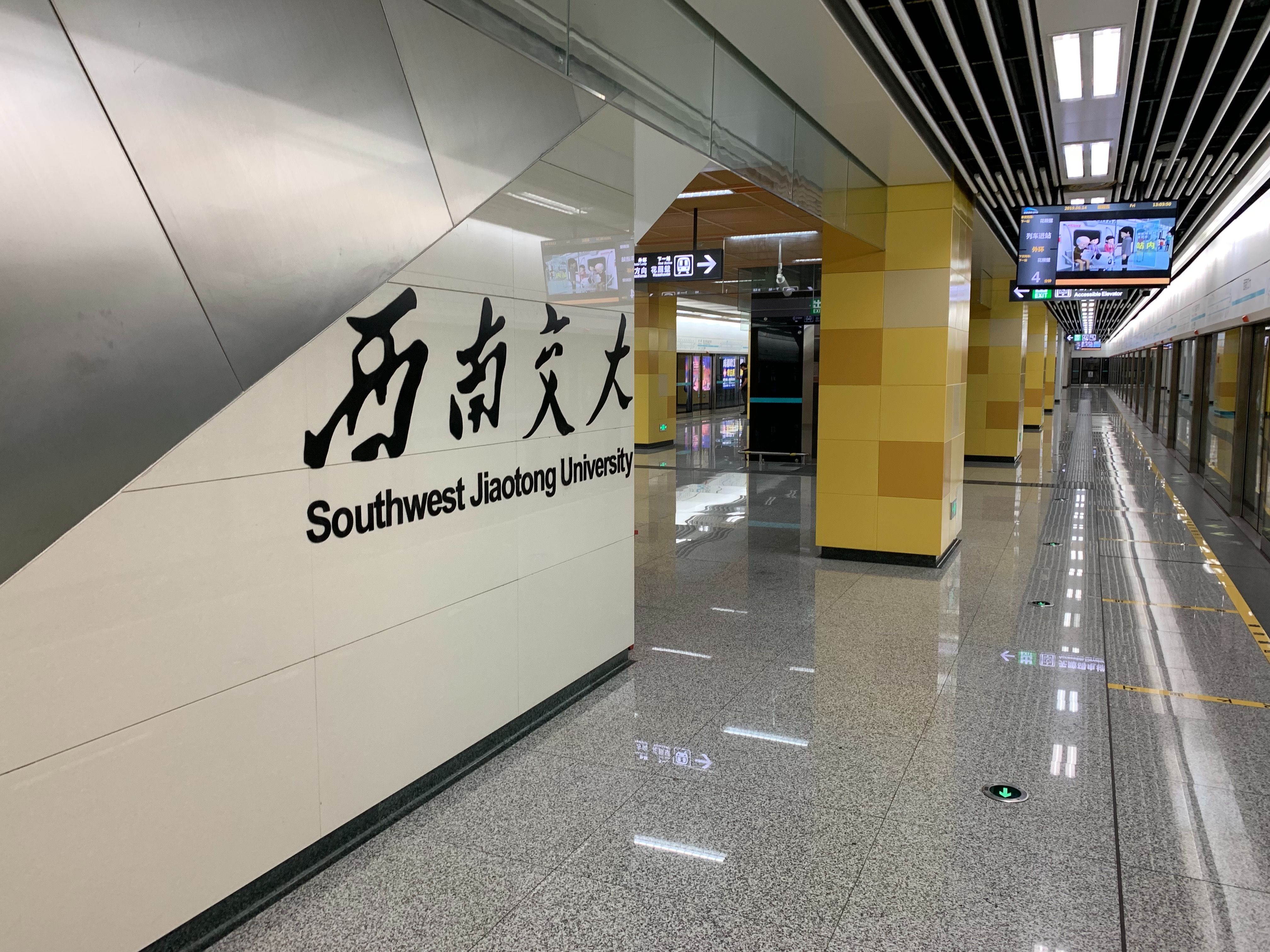 成都地铁西南交大站